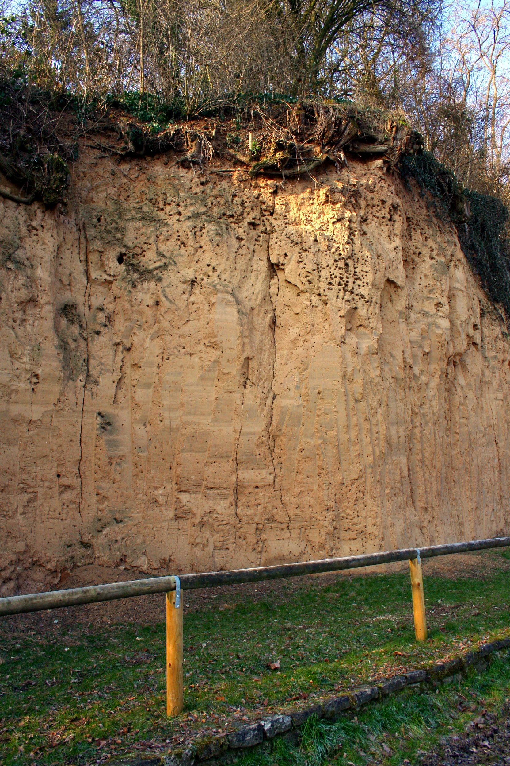 Lösswand Austraße am Neckar in Stuttgart-Münster